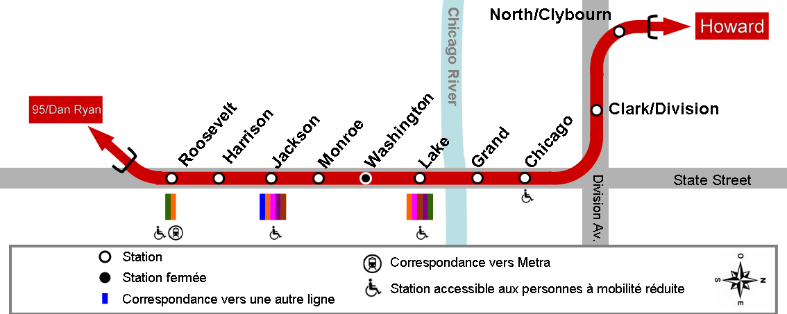 Nouveau Plan State Street Subway avec Chicago River